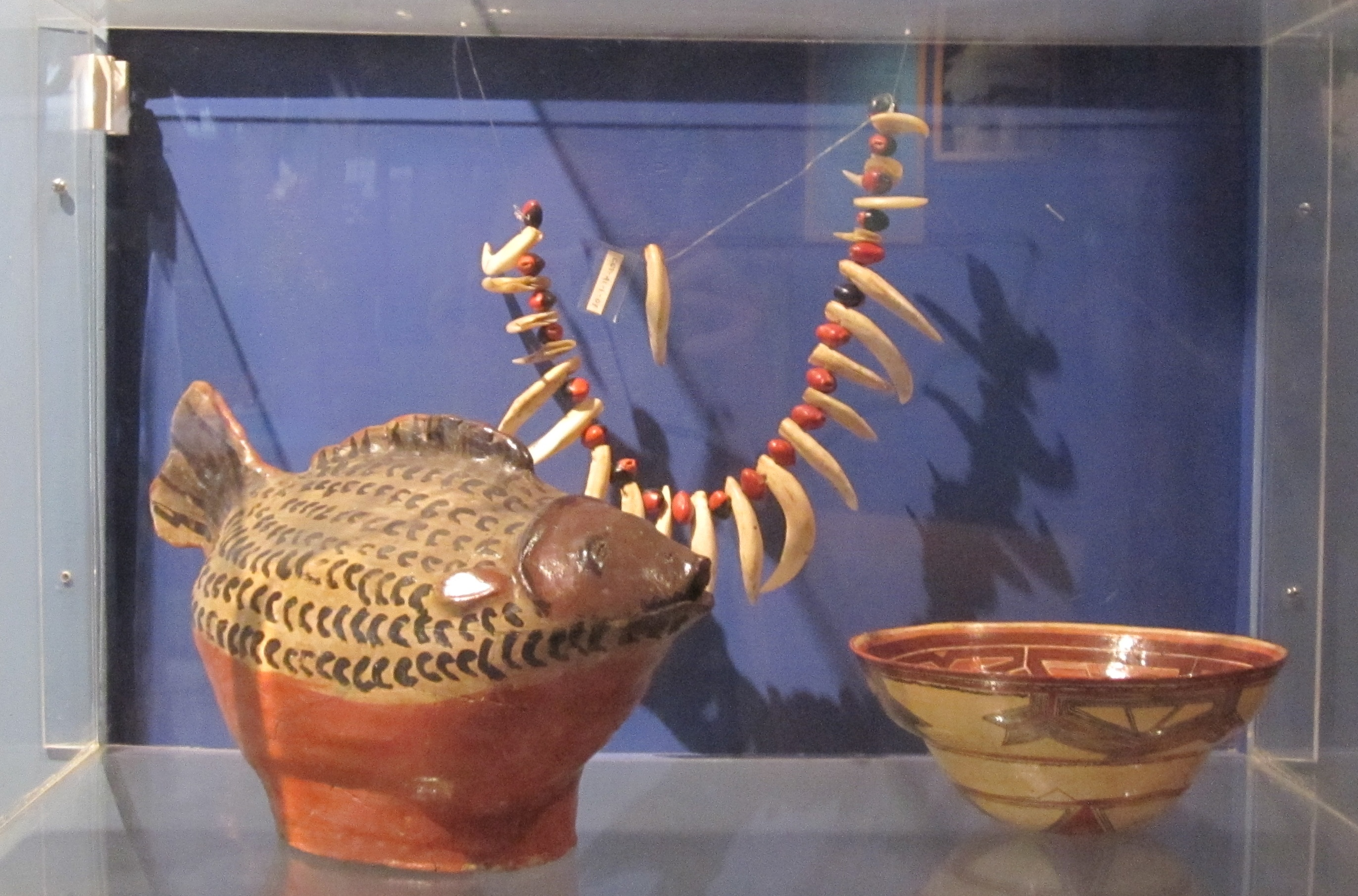 Amazonian Quichua objects